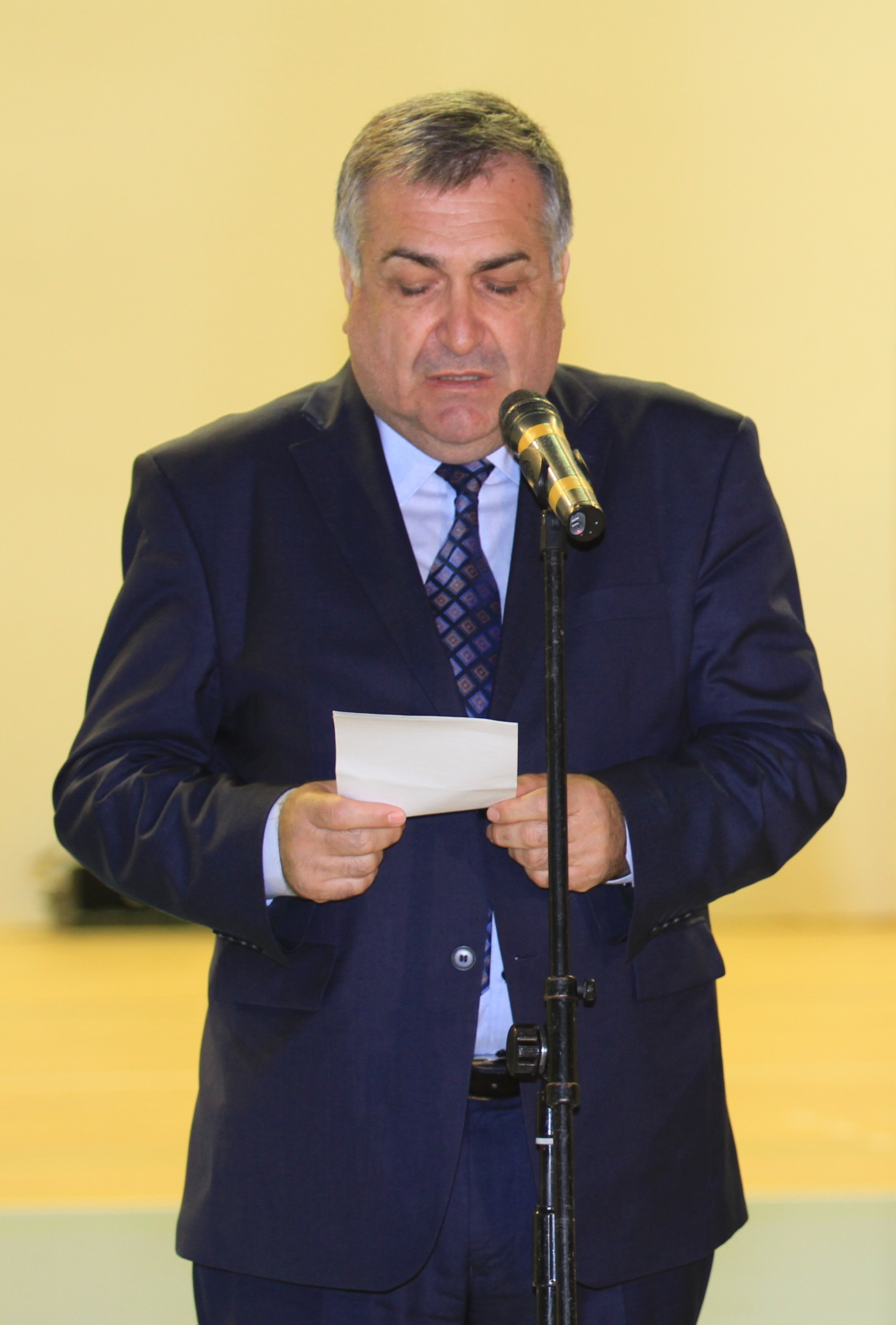 Премиерът на България Георги Близнашки и кматя на Община Сливница Васко Стоилков по време на тържествата за "50 години Сливница град"